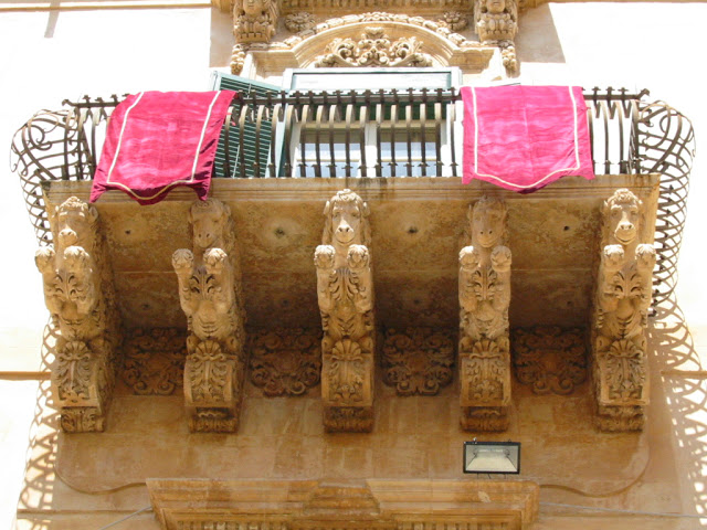 Balcone barocco di Noto